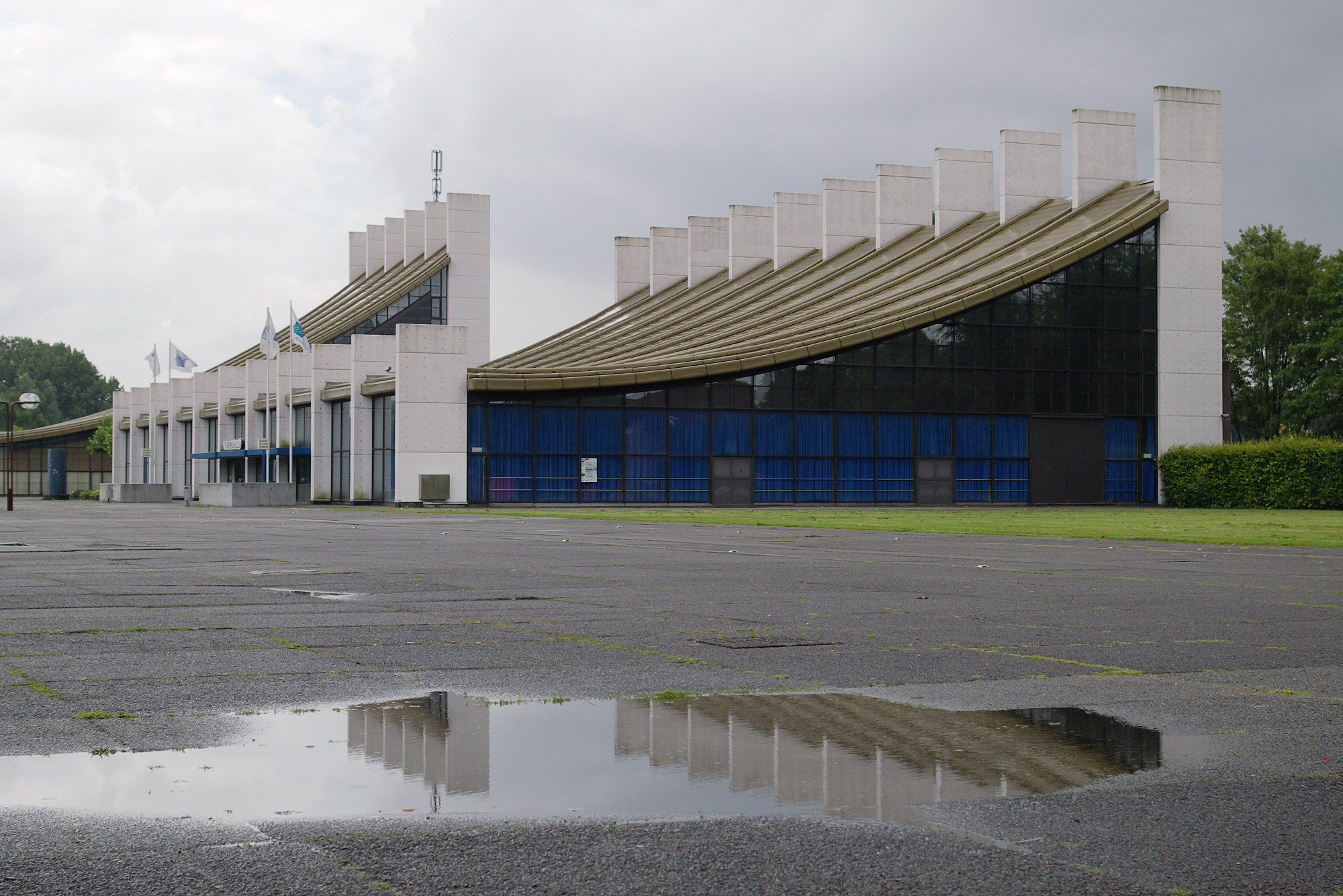 Europahalle Castrop-Rauxel, im Hintergrund die Stadthalle